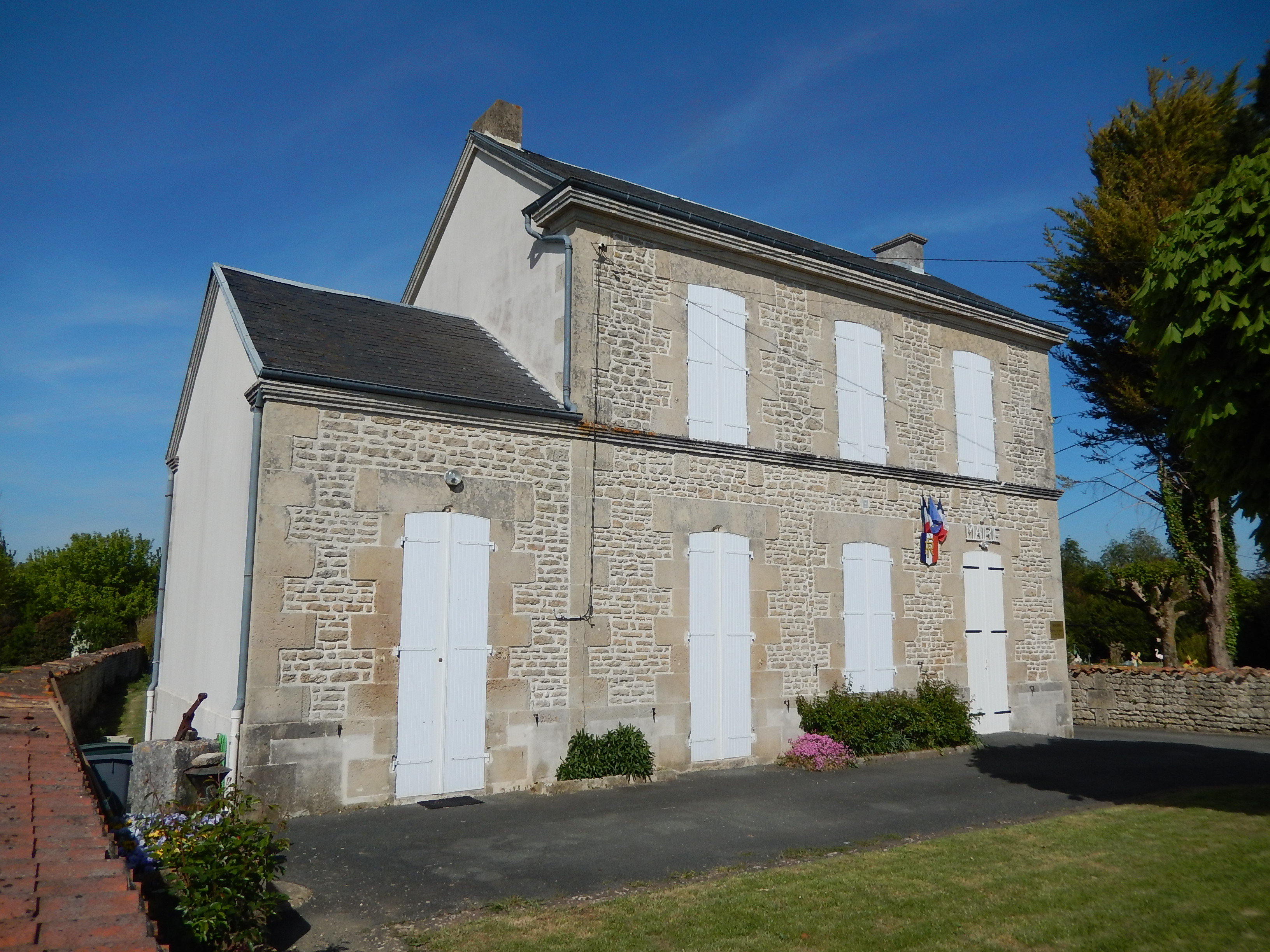 La mairie de Saint-Martial (Charente-Maritime, France).